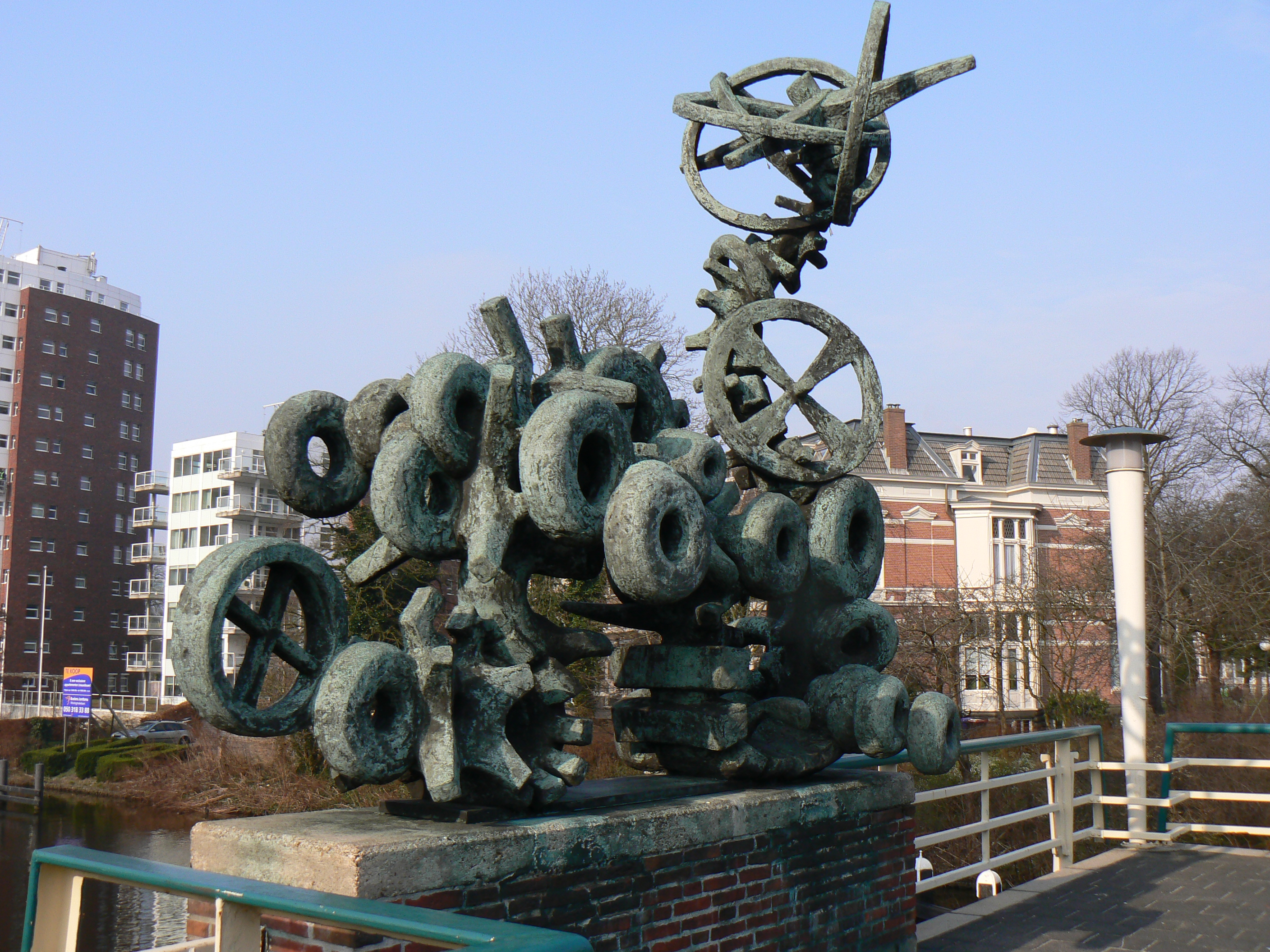 sculpture Het Verkeer (1967/1959) by Willem Reyers in Groningen/The Netherlands